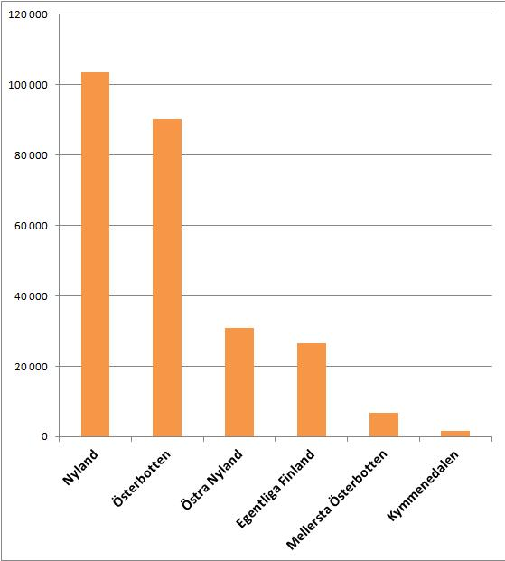 Antal svenskspråkiga per landskap i Finland vid årsskiftet 2005/2006.